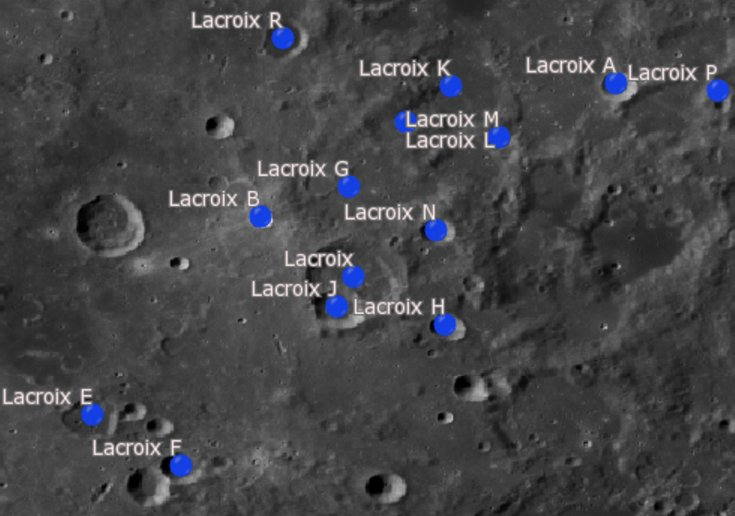 Cráter lunar Lacroix. Cráteres satélite. (Imagen LRO)